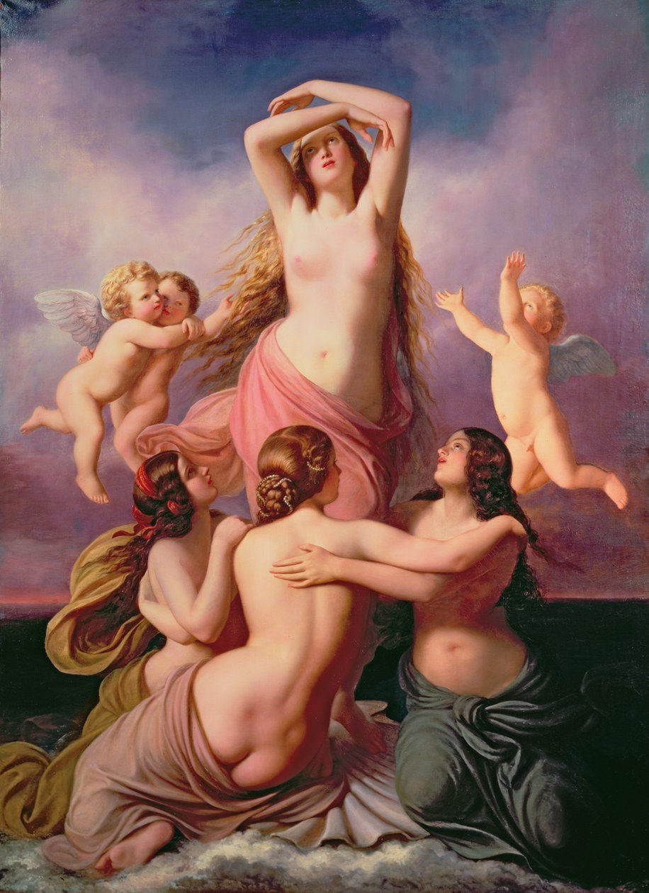 ? × ? cm